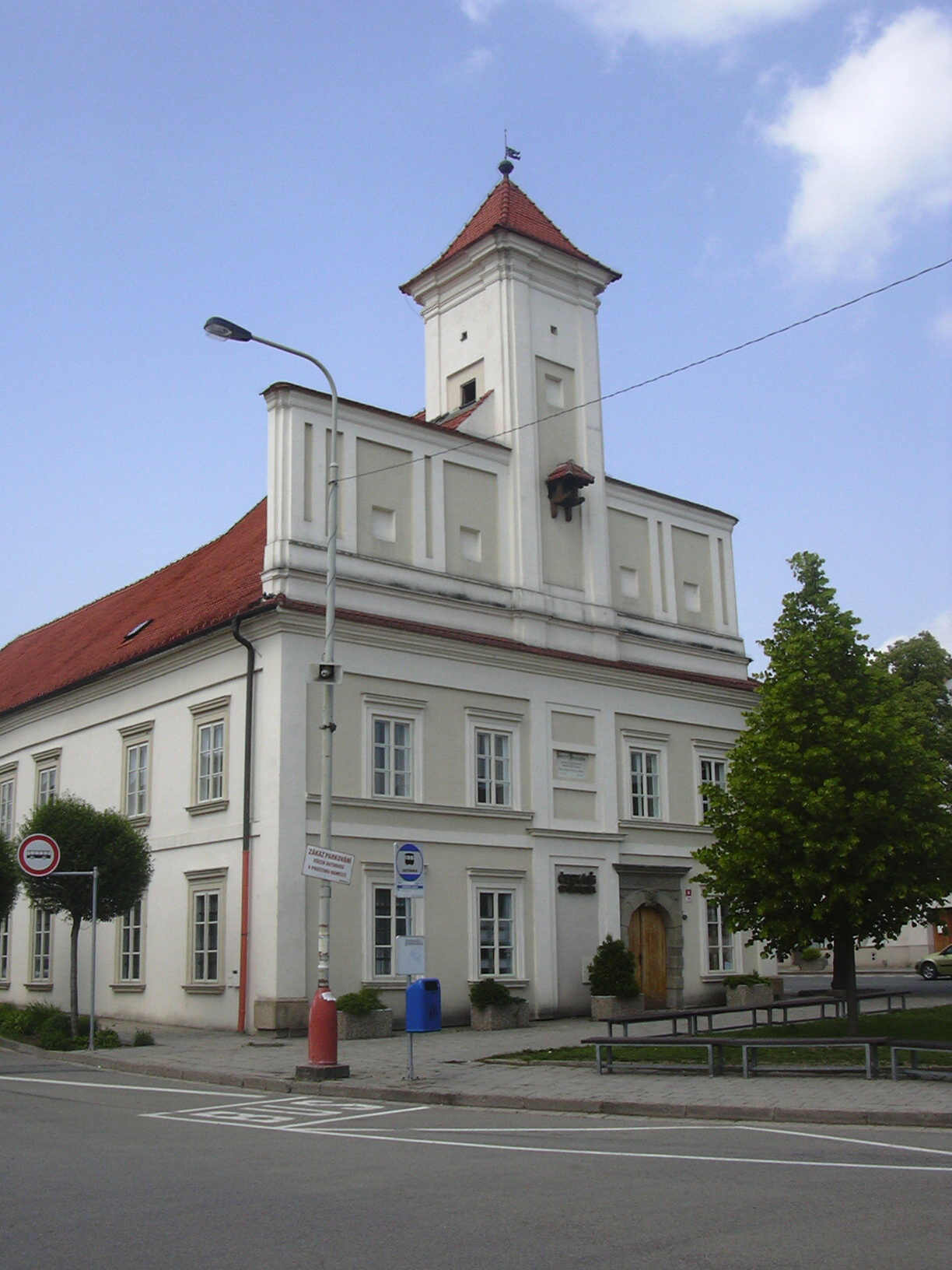 Rousínov, okres Vyškov. Stará radnice.)